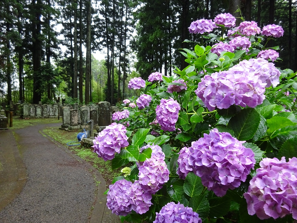 多古町日本寺